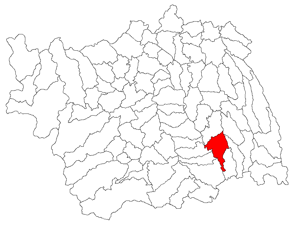 Categorie:Hărţi ale judeţului Bacău